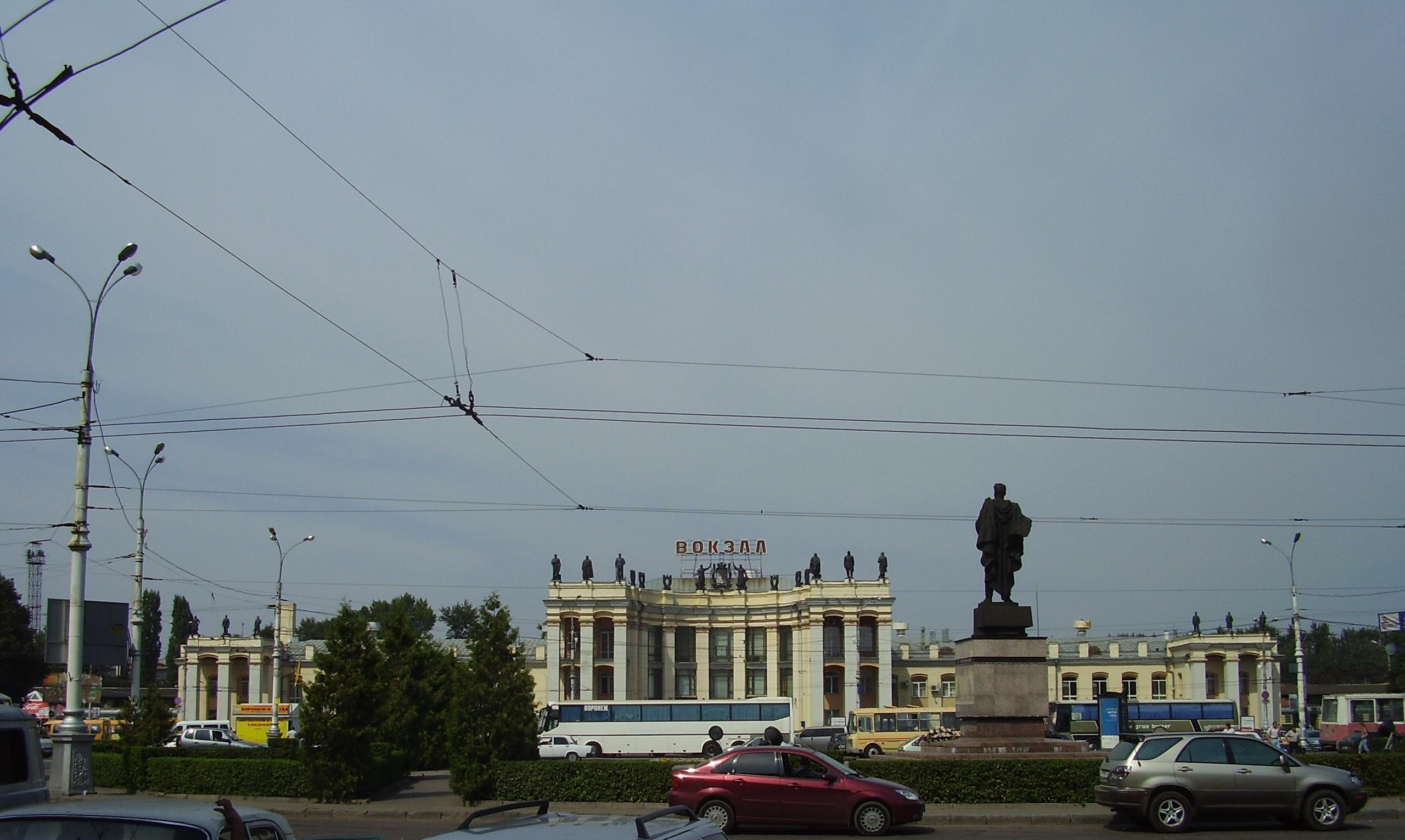 Вокзал "Воронеж-1" (площадь Черняховского, памятник которому поставлен в середине площади)